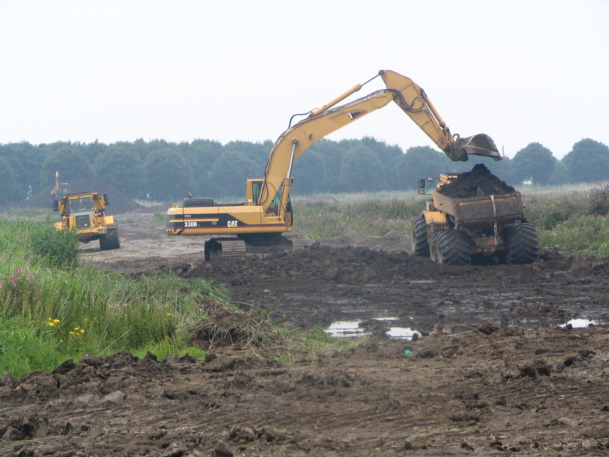 eigen foto. Oostvaarderveld juli 2004 - GerardM 16 aug 2004 20:46 (CEST) Nature being developed, Oostvaardersveld, Oostvaardersplassen, Flevoland, the Netherlands -yes, the Dutch do develop nature.;)